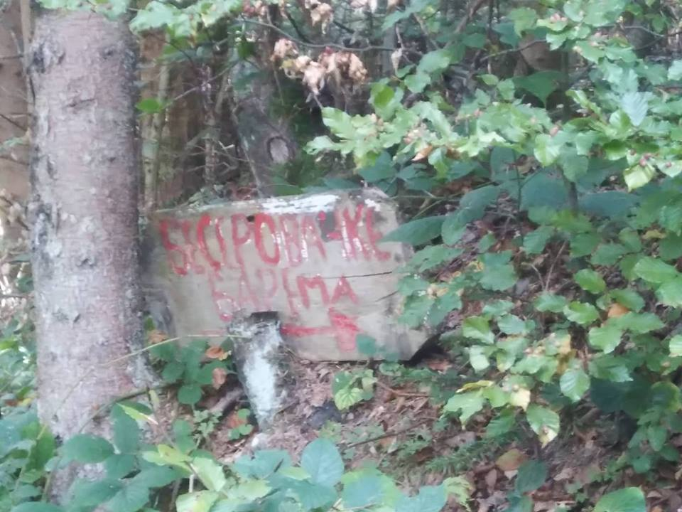 Знак за скретање за Бесеровачке Баре